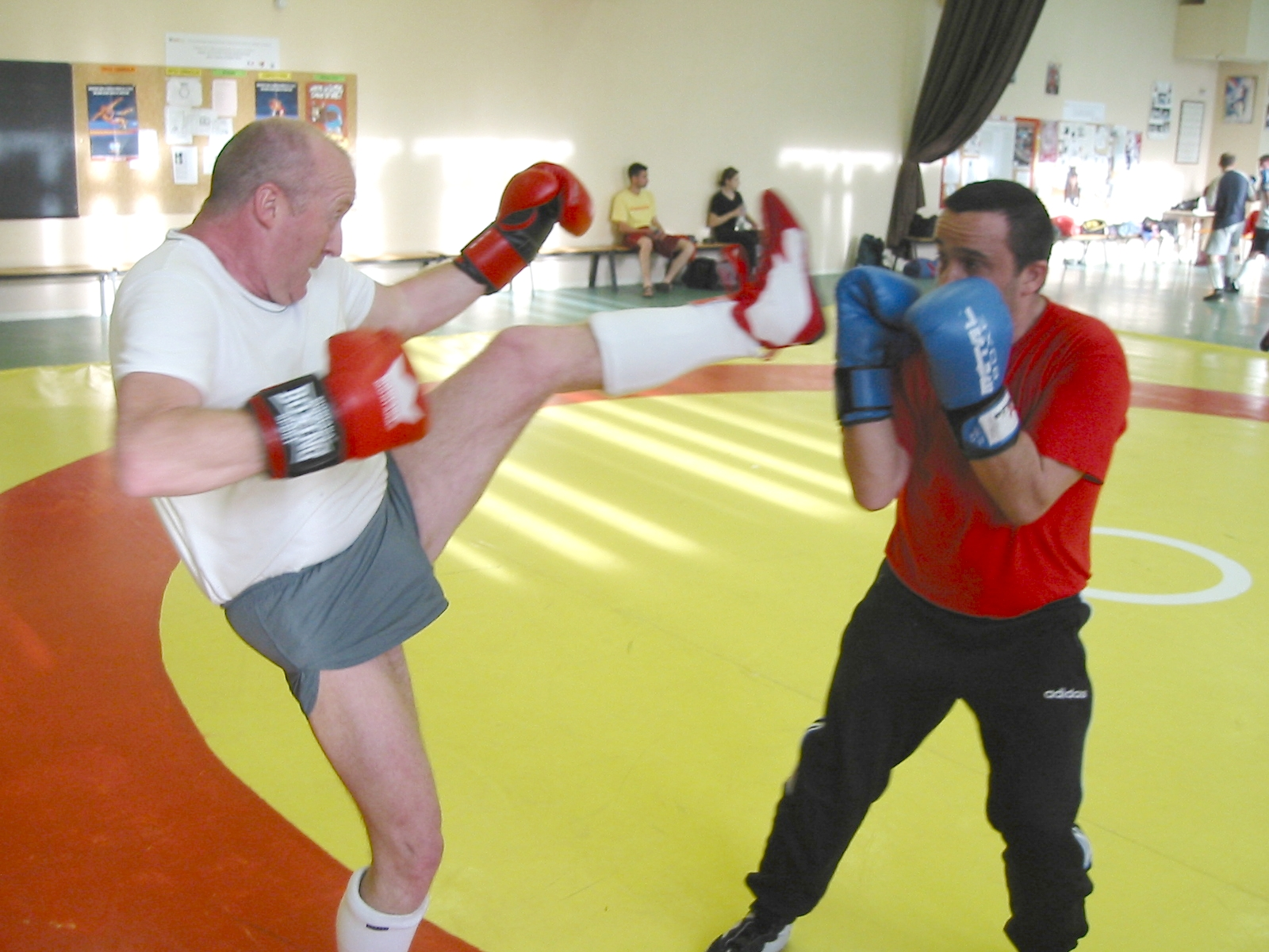 Boxe Française. Le chassé frontal.